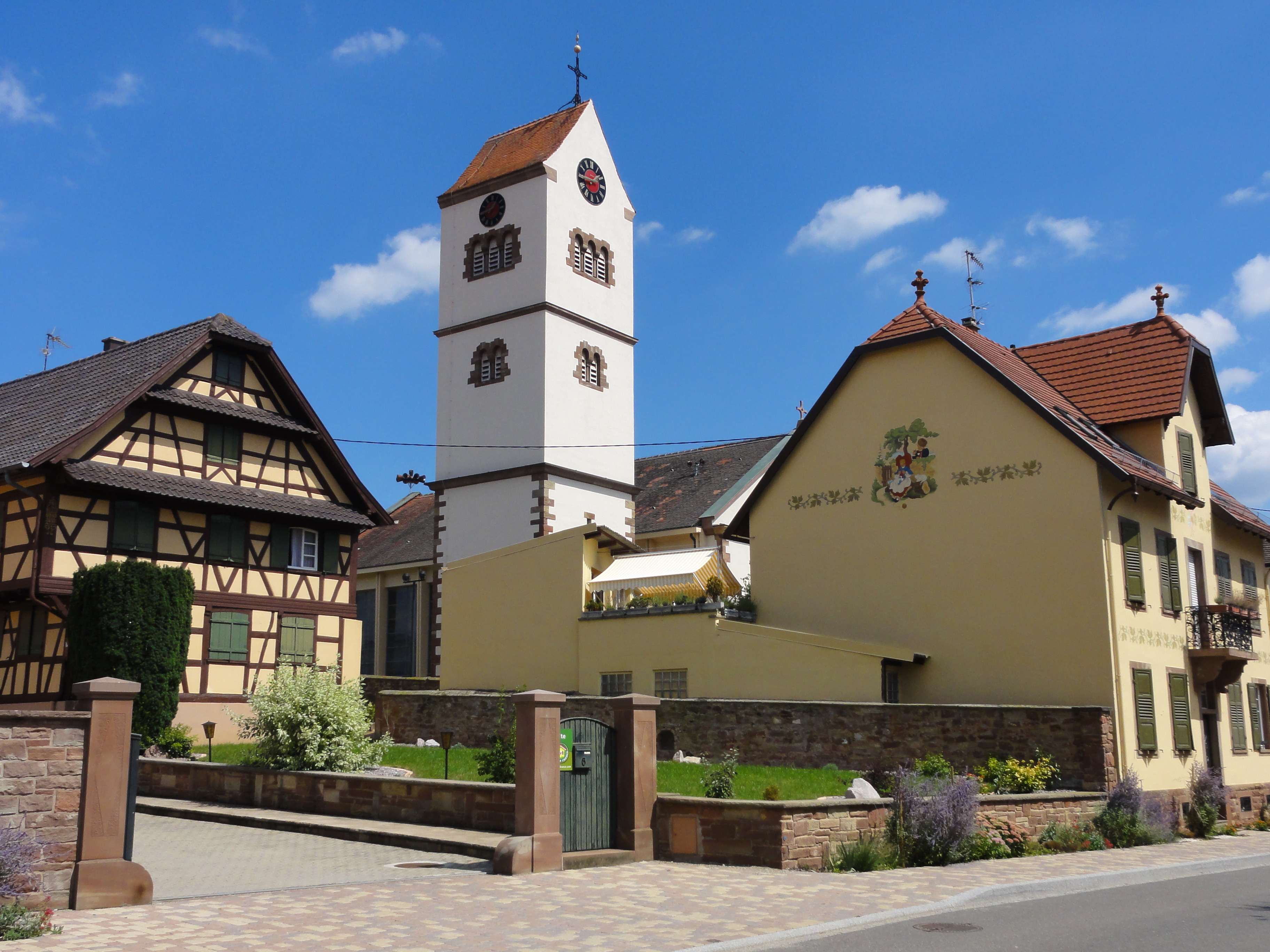 Alsace, Bas-Rhin, Truchtersheim, Église Saints-Pierre-et-Paul (IA67000997).